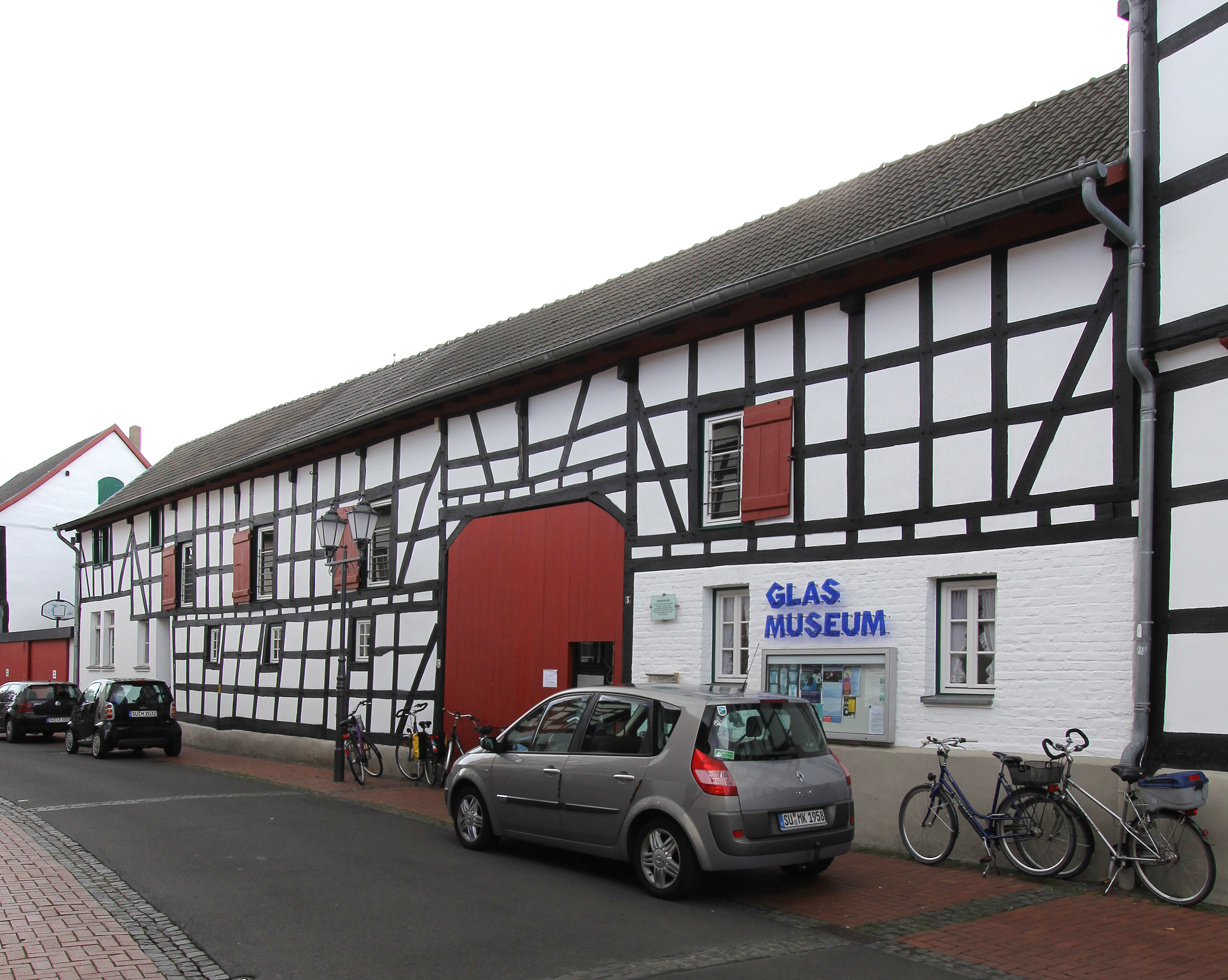 Rheinbach, Polligsstr. 3-5, Himmeroder Hof - heute genutzt als Glasmuseum